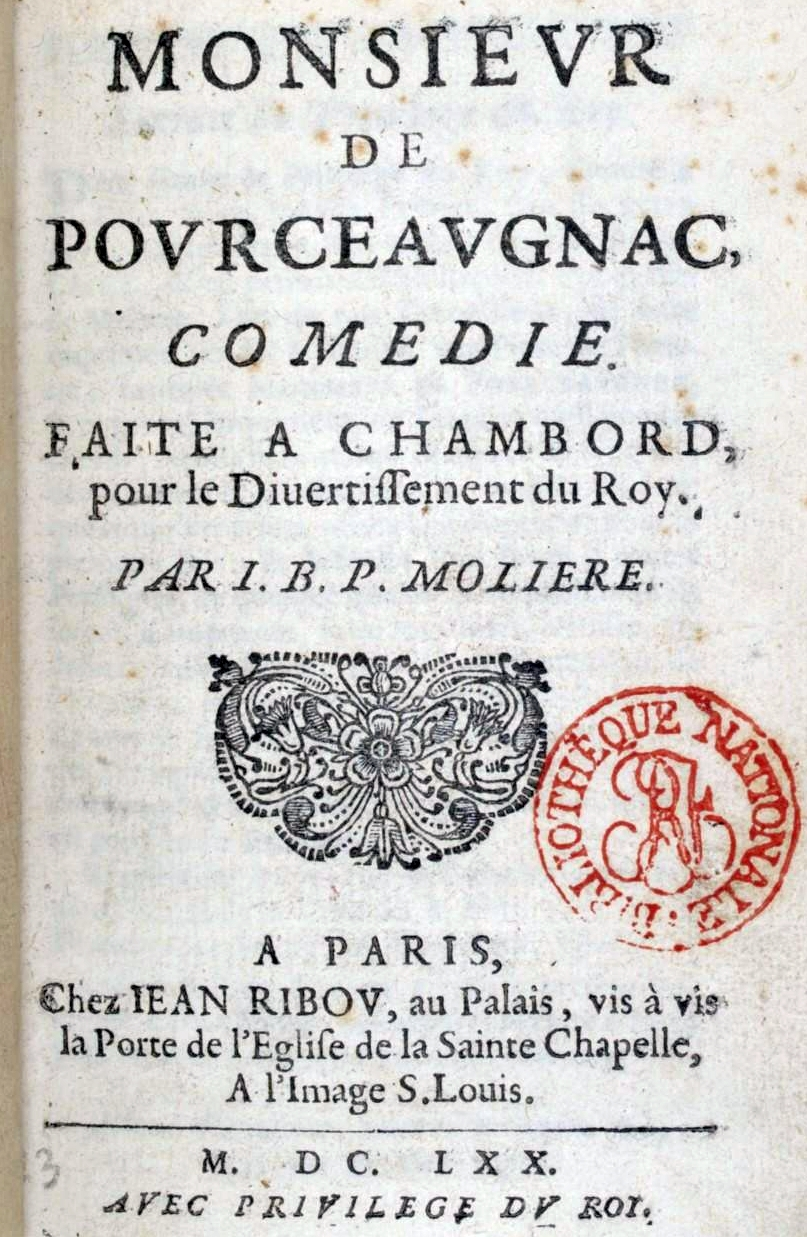 page de couverture de Monsieur de Pourceaugnac, comédie de Molière joué au château de Chambord le 6 octobre 1669, pour le divertissement du Roi. Édition 1670.